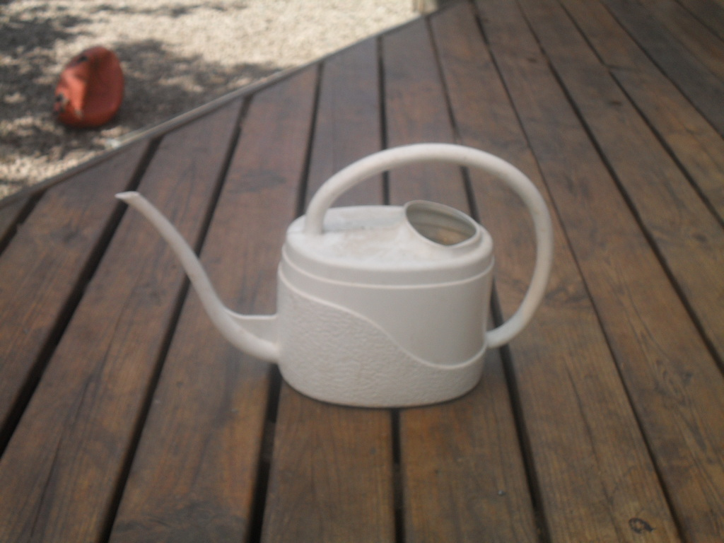 En vit vattenkanna